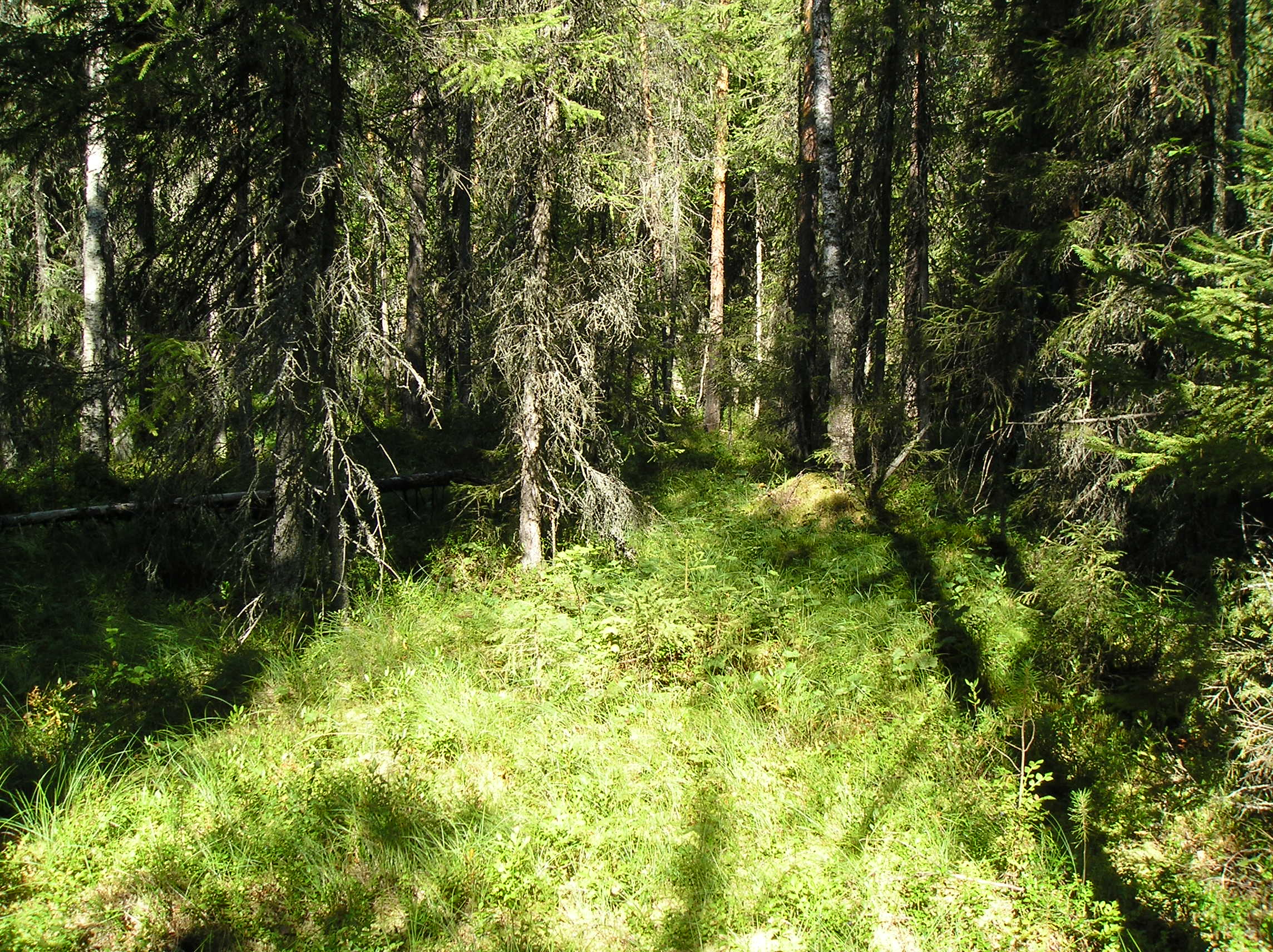 Тайга.